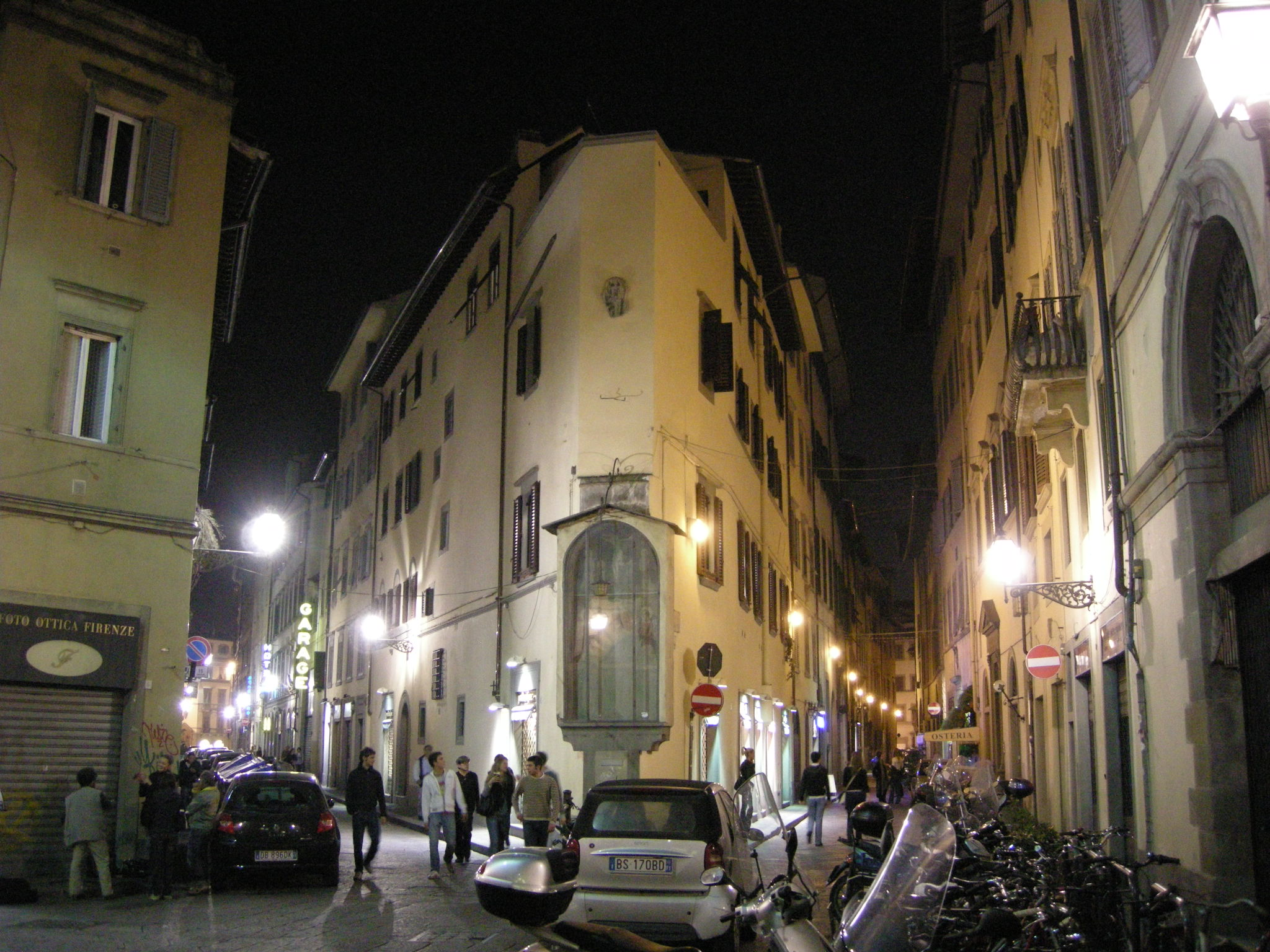 Via del sole via delle belle donne by night